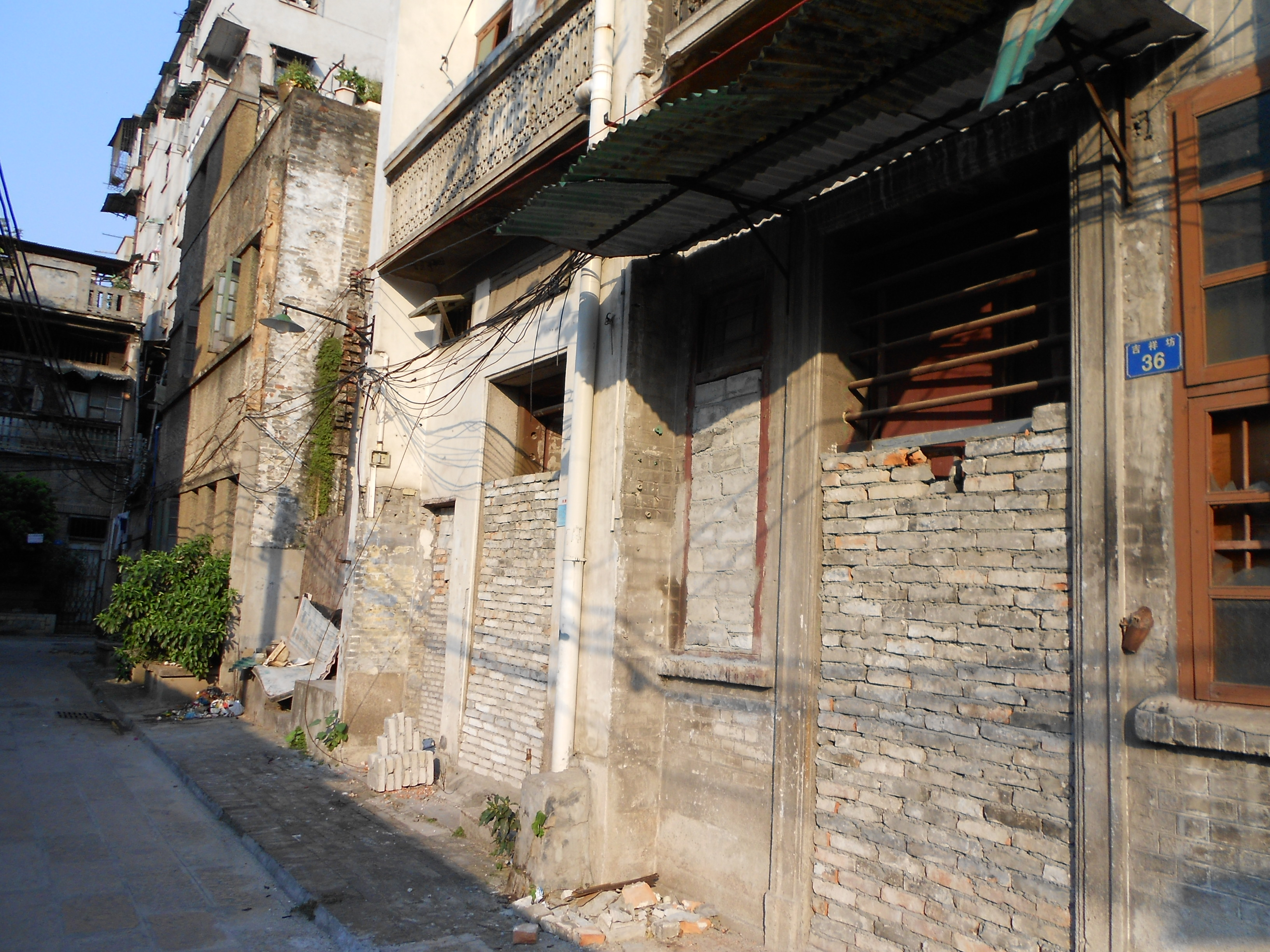 恩寧路舊城改造項目，這些是人去樓空的房屋，窗戶和趟籠門均被砌上磚頭。